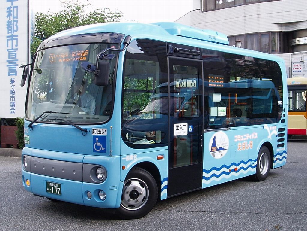 Kanachu Bus Chi107（ち110） Hino Poncho II ADG-HX6JHAE